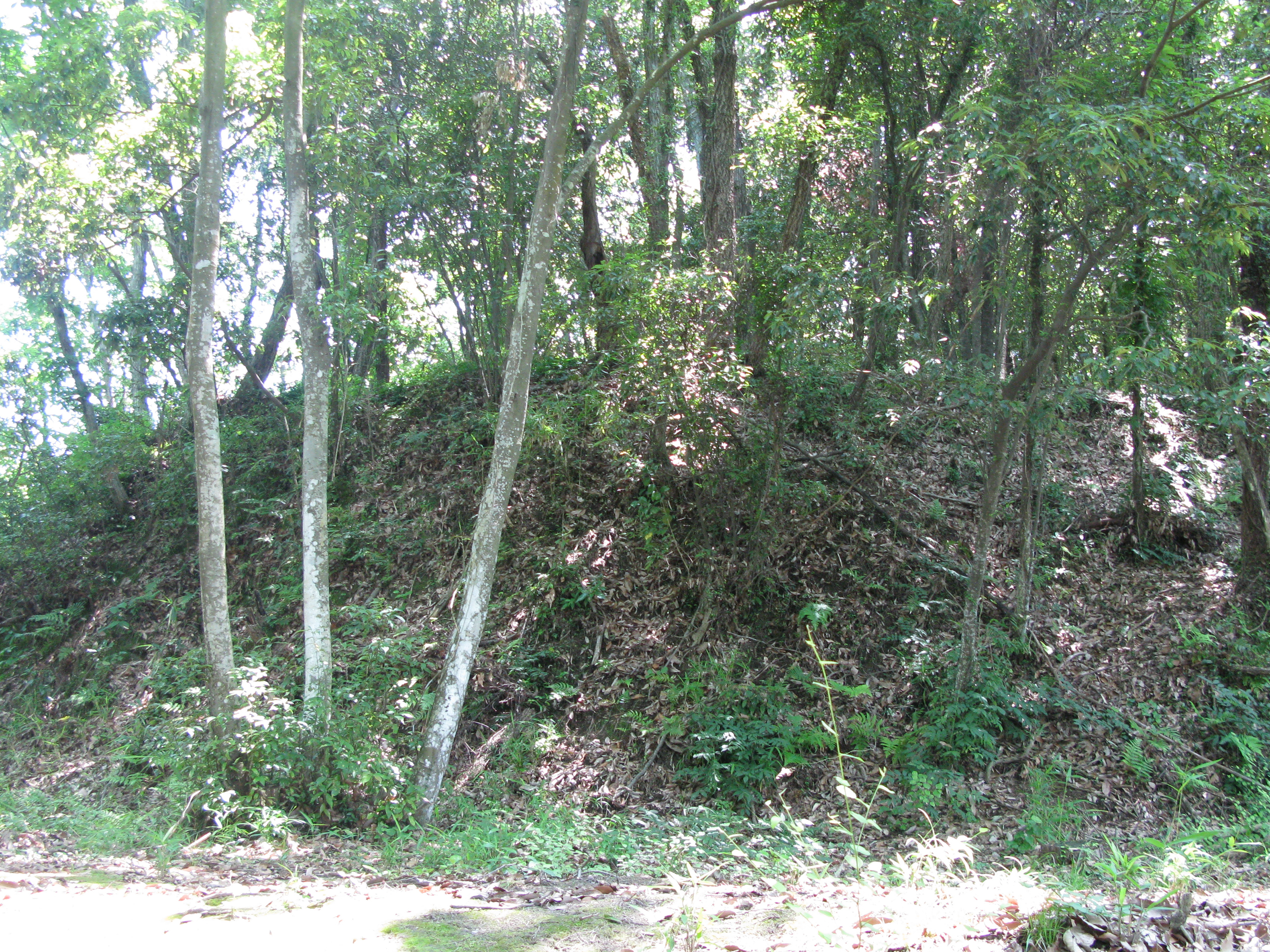 木村城